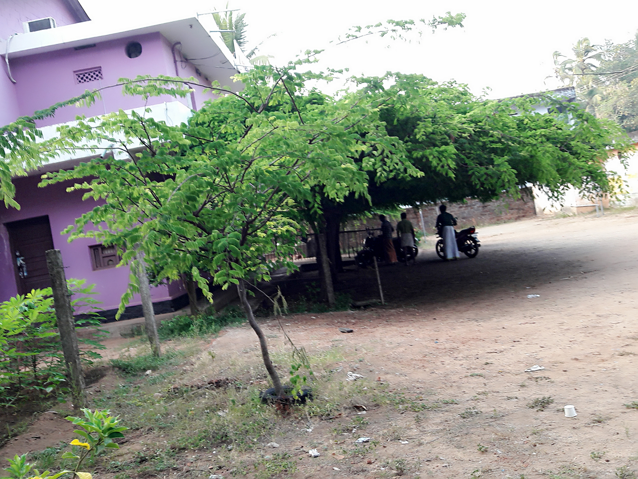 മലപ്പുറം ജില്ലയിലെ പൊന്നാനി താലൂക്കില്‍ പാലപ്പെട്ടി താജ് ടാക്കീസില്‍ തണല്‍ ഒരുക്കുന്ന ഡിവി ഡിവി മരങ്ങള്‍.